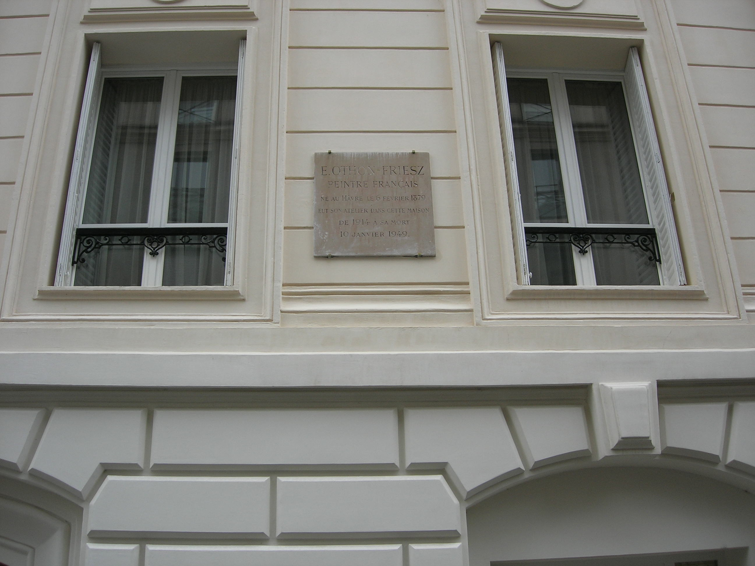 Atelier d'Othon Friesz, rue Notre-Dame-des-Champs, Paris VIème